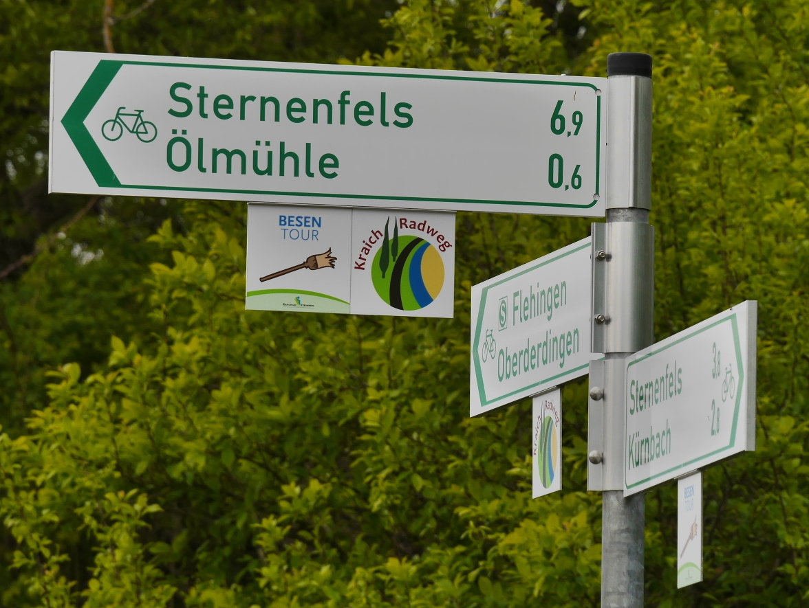 Logo-Einhänger Kraichradweg